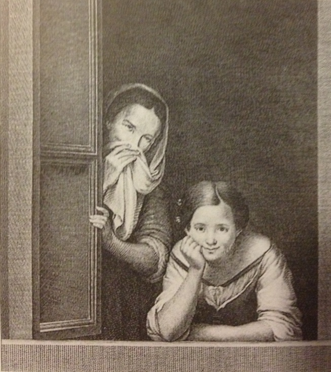 Grabado de Joaquín Ballester Mujeres en la ventana, copia de un cuadro de Murillo